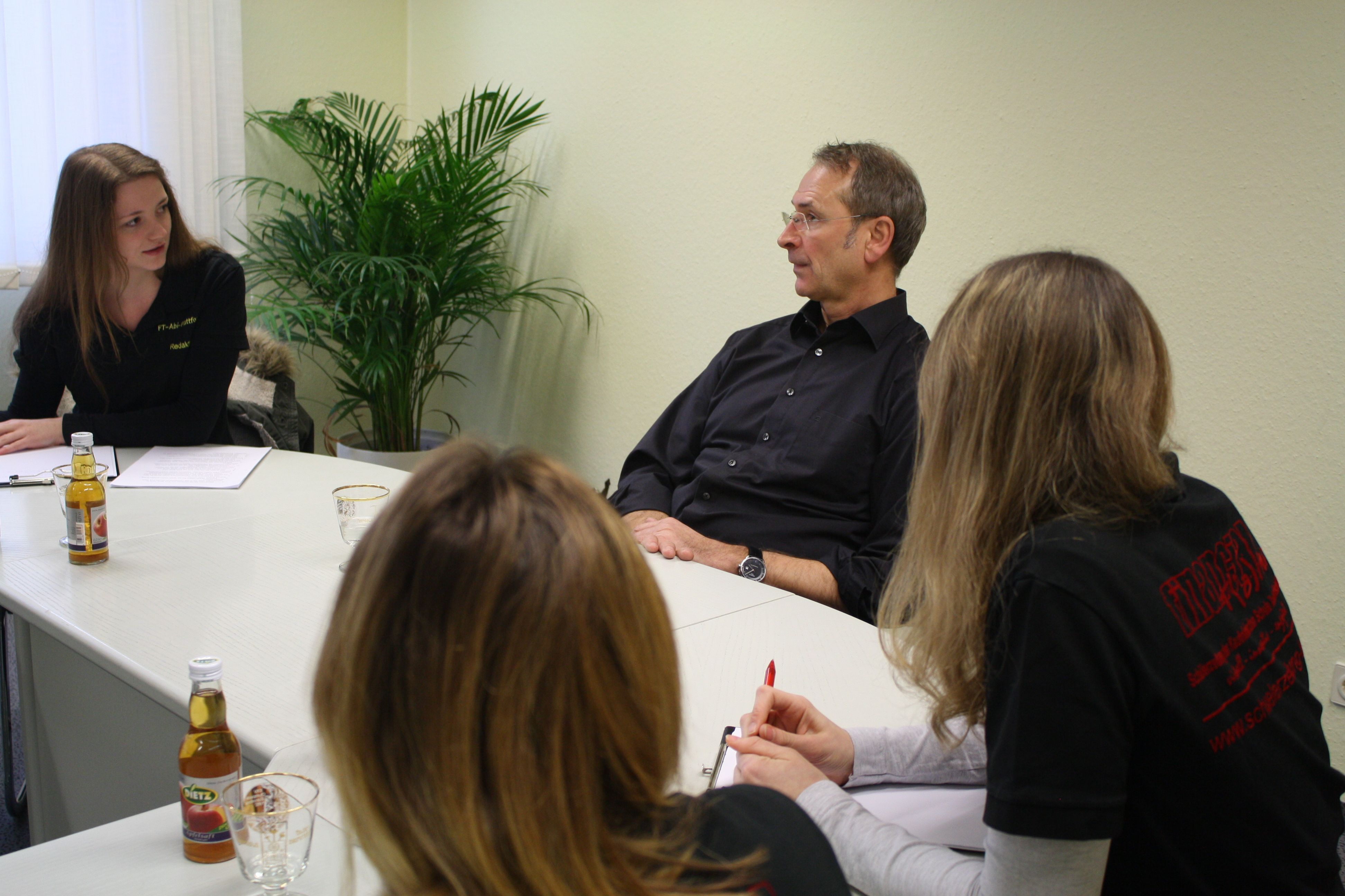 Financial T('a)ime (FT), Schülerzeitung der Kaufmännischen Schule Tauberbischofsheim.